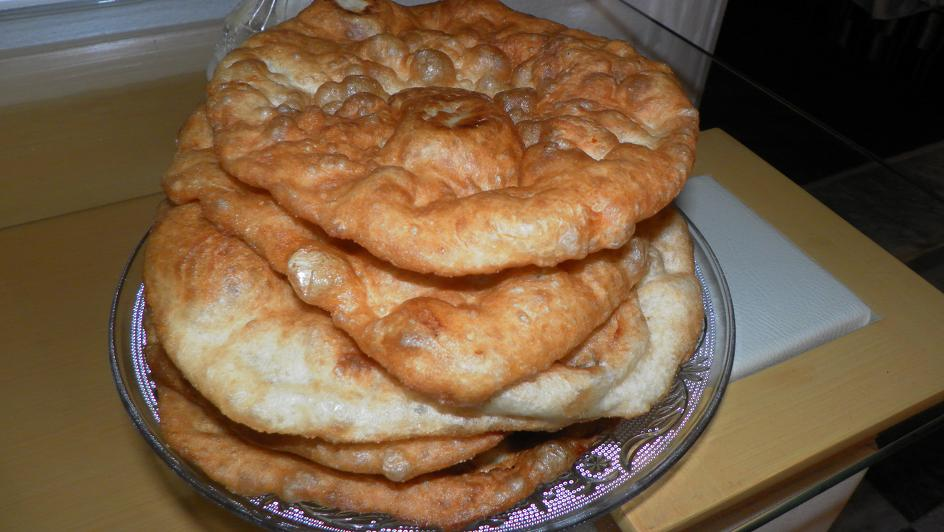 السفنج الليبي، دونت ليبي مثل السفنج، في عمان